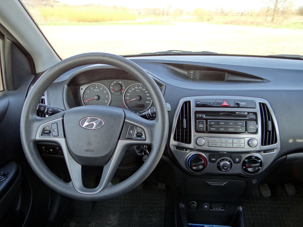 Deska rozdzielcza.